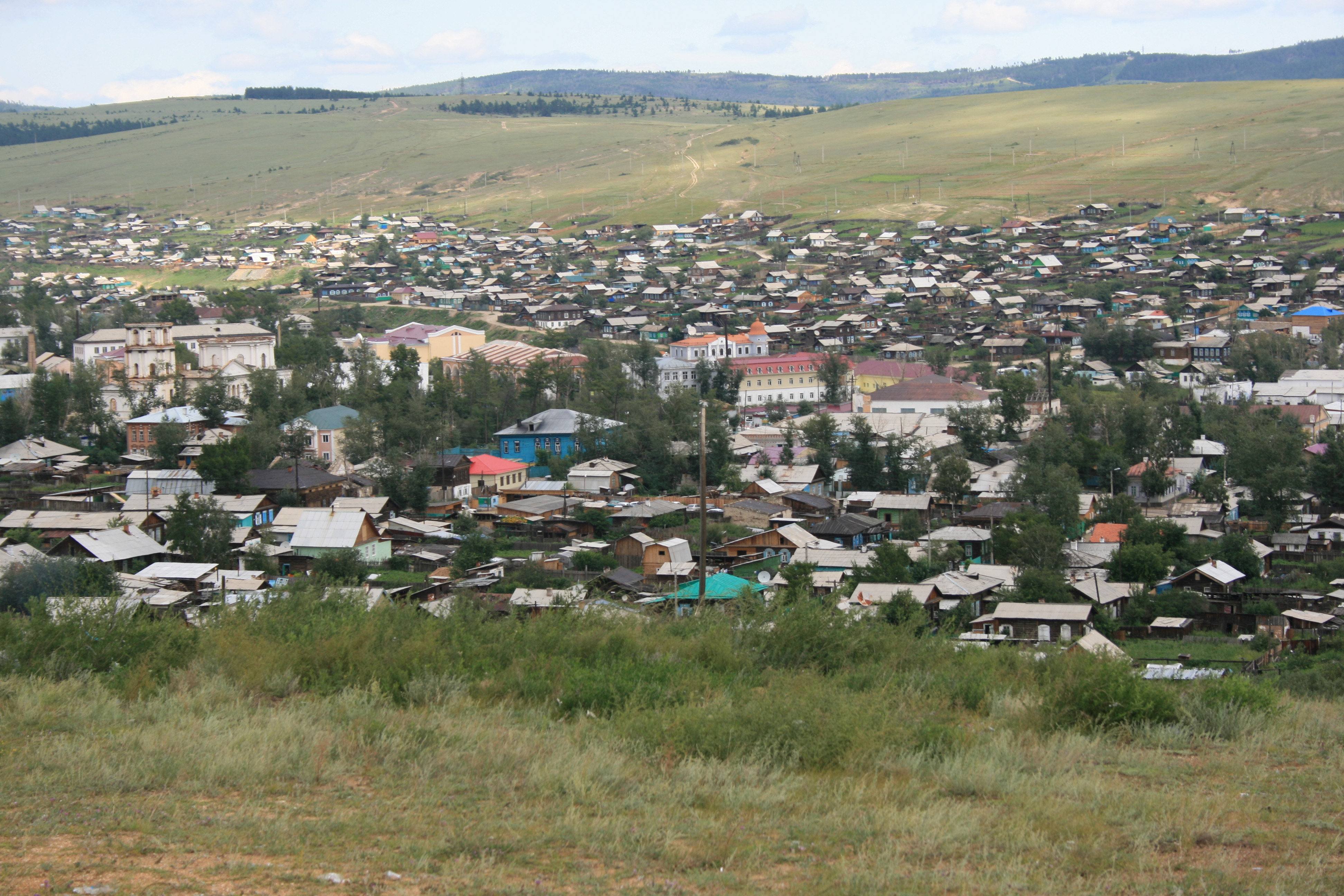 Кяхта, вид с горы Кяхта (Бурятия)